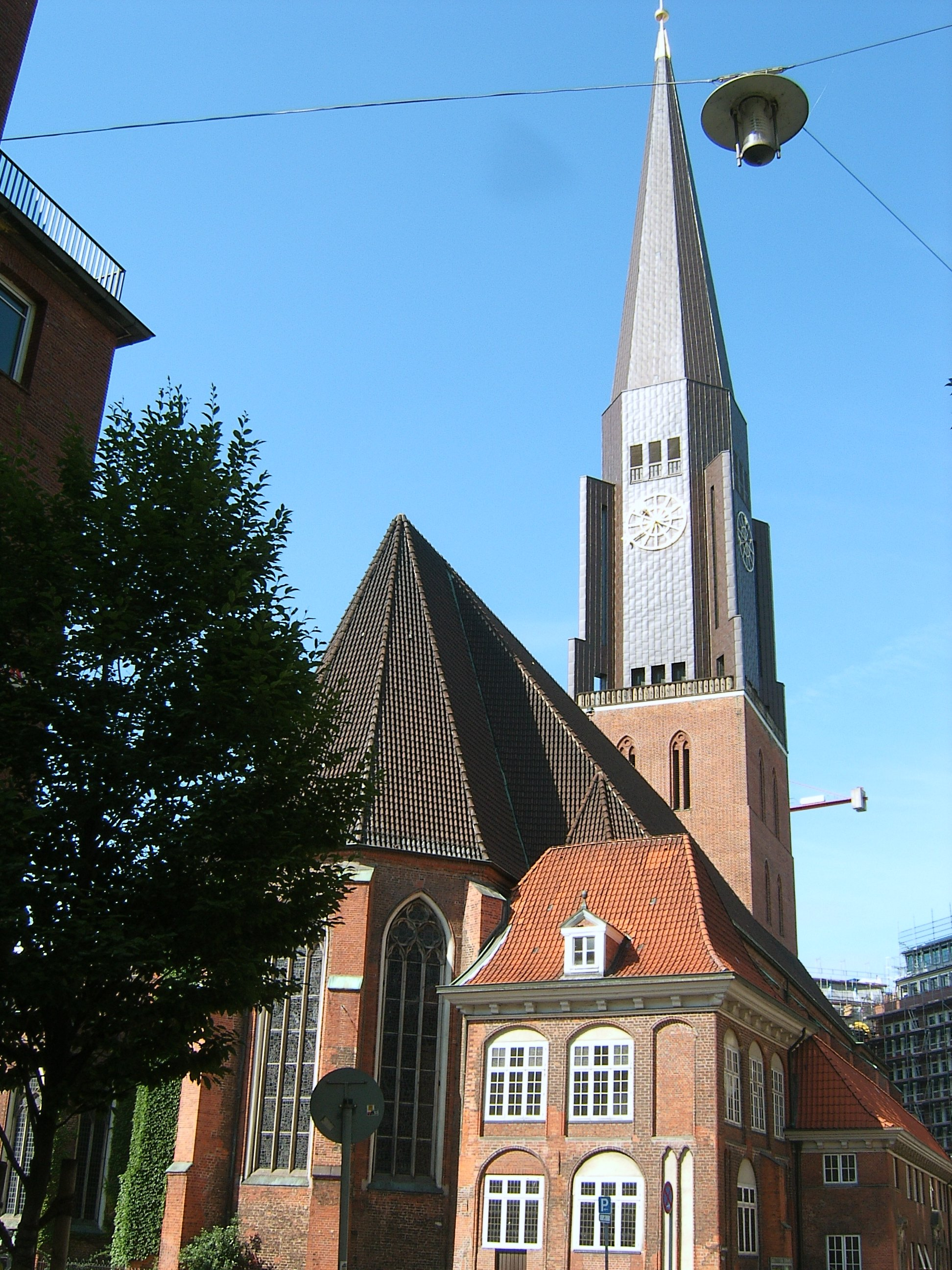 Die Hauptkirche St. Jacobi in Hamburg-Altstadt. This is a photograph of an architectural monument.